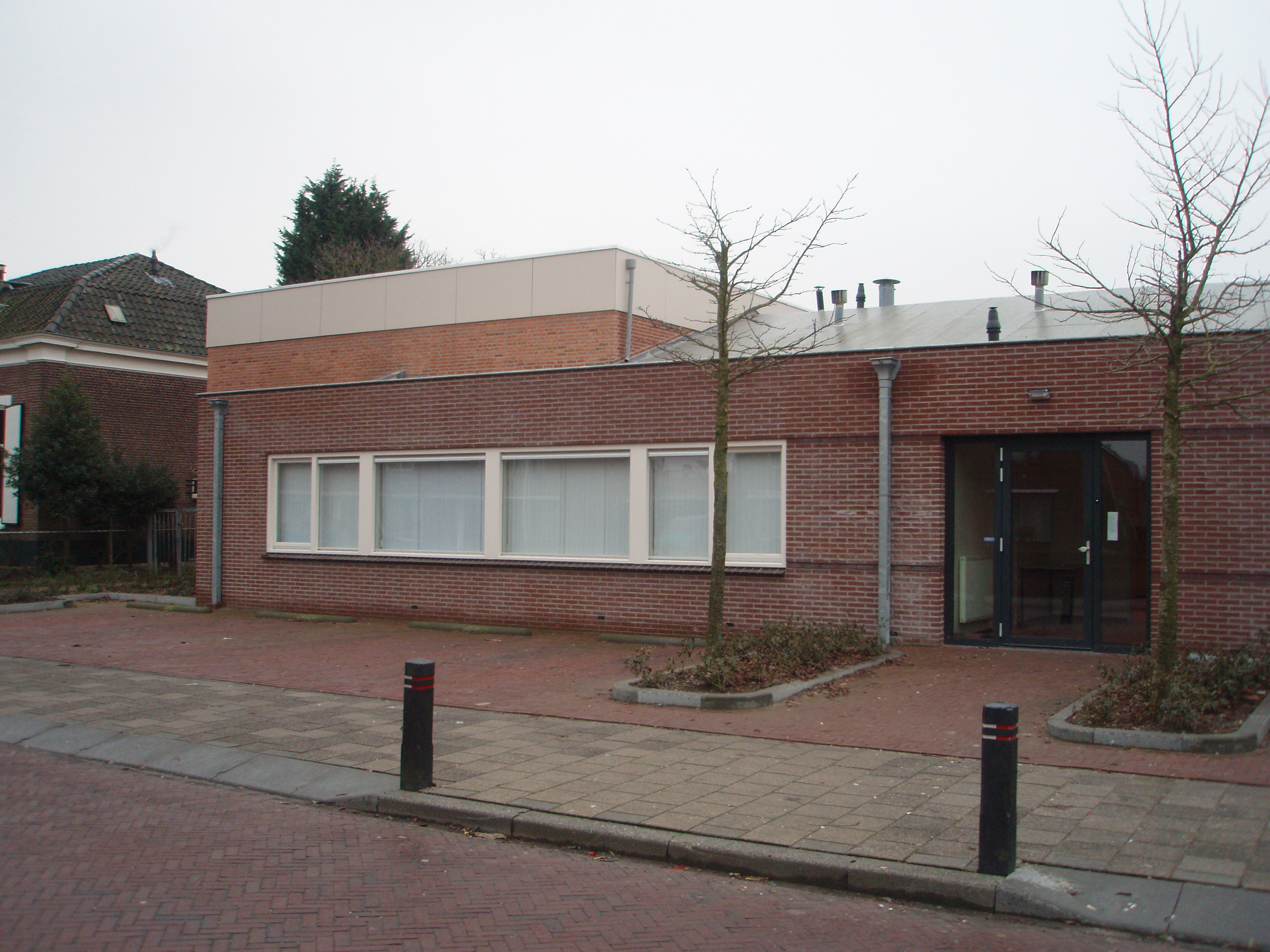 Gymzaal PWA-school in Echteld